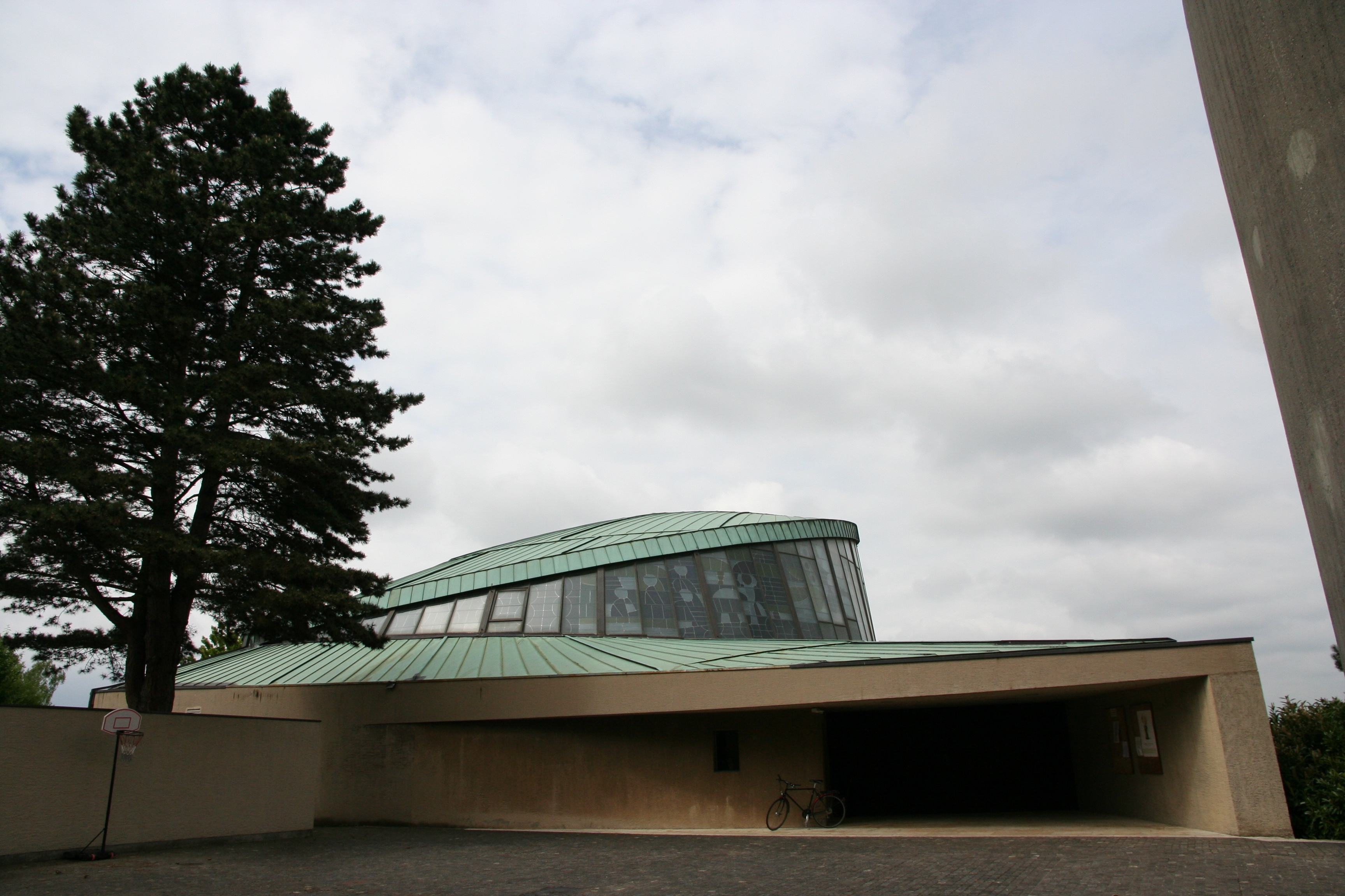 Römisch-katholische Kirche Bruder KIaus Basel, Eingangspartie